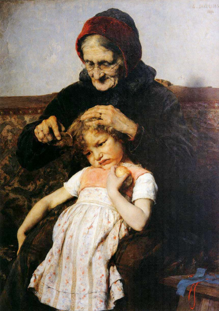 "The Combing of Granddaughter" - "Το Κτένισμα της Εγγονής"